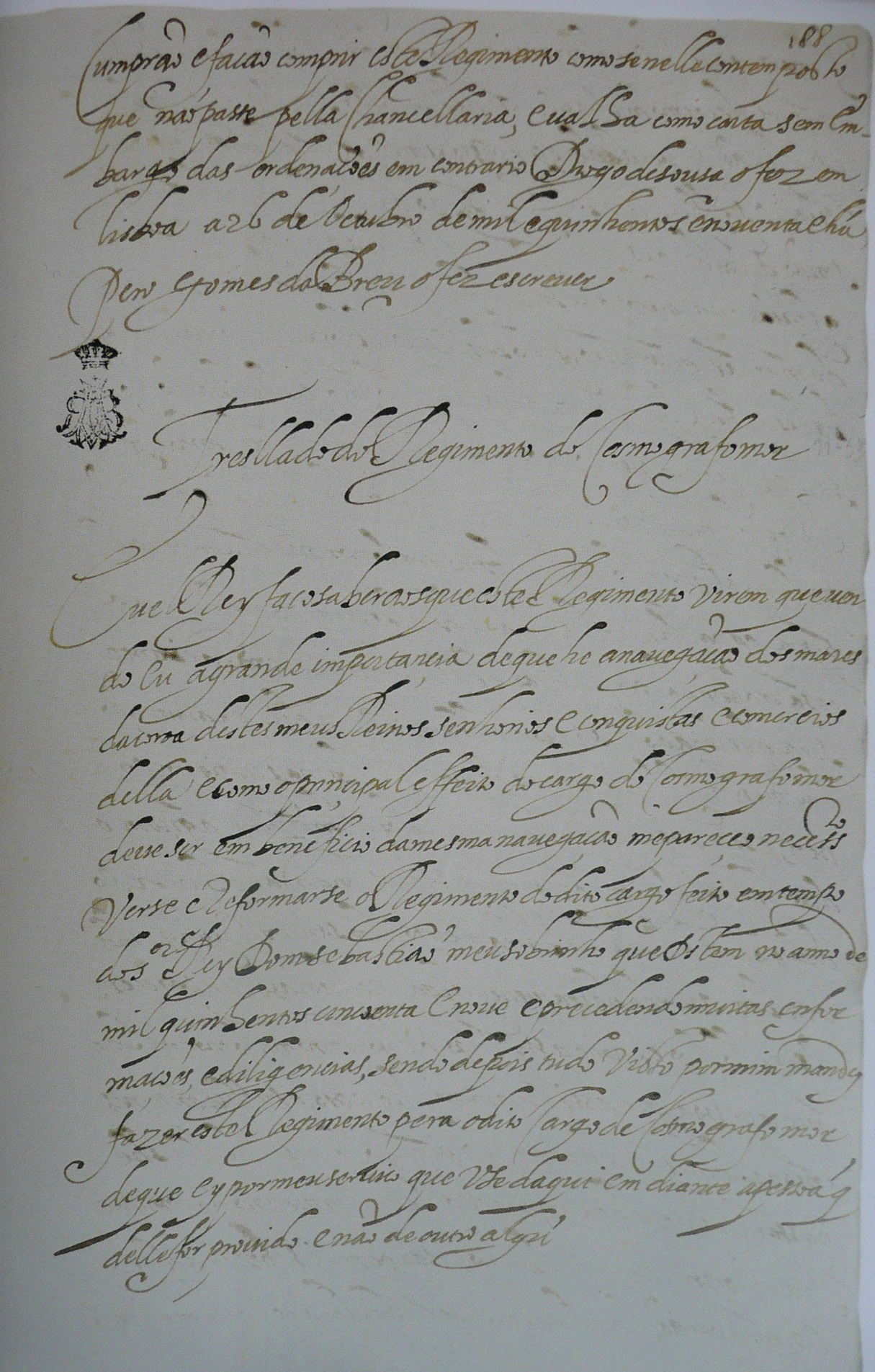 règlement des cosmographes généraux du Portuagl : 1592